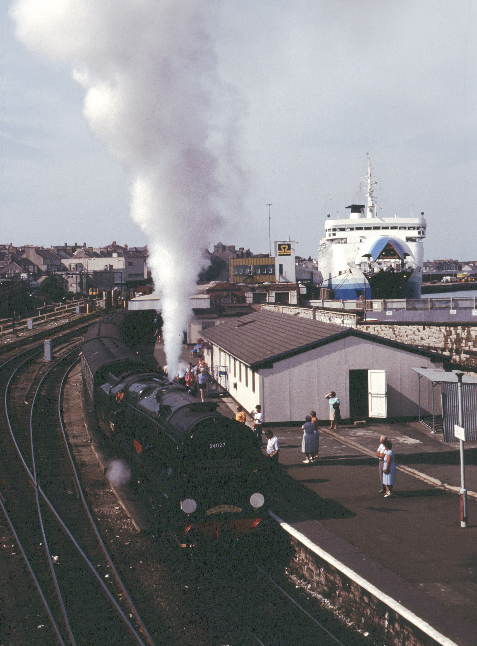 Bahnhof Holyhead (Westseite)